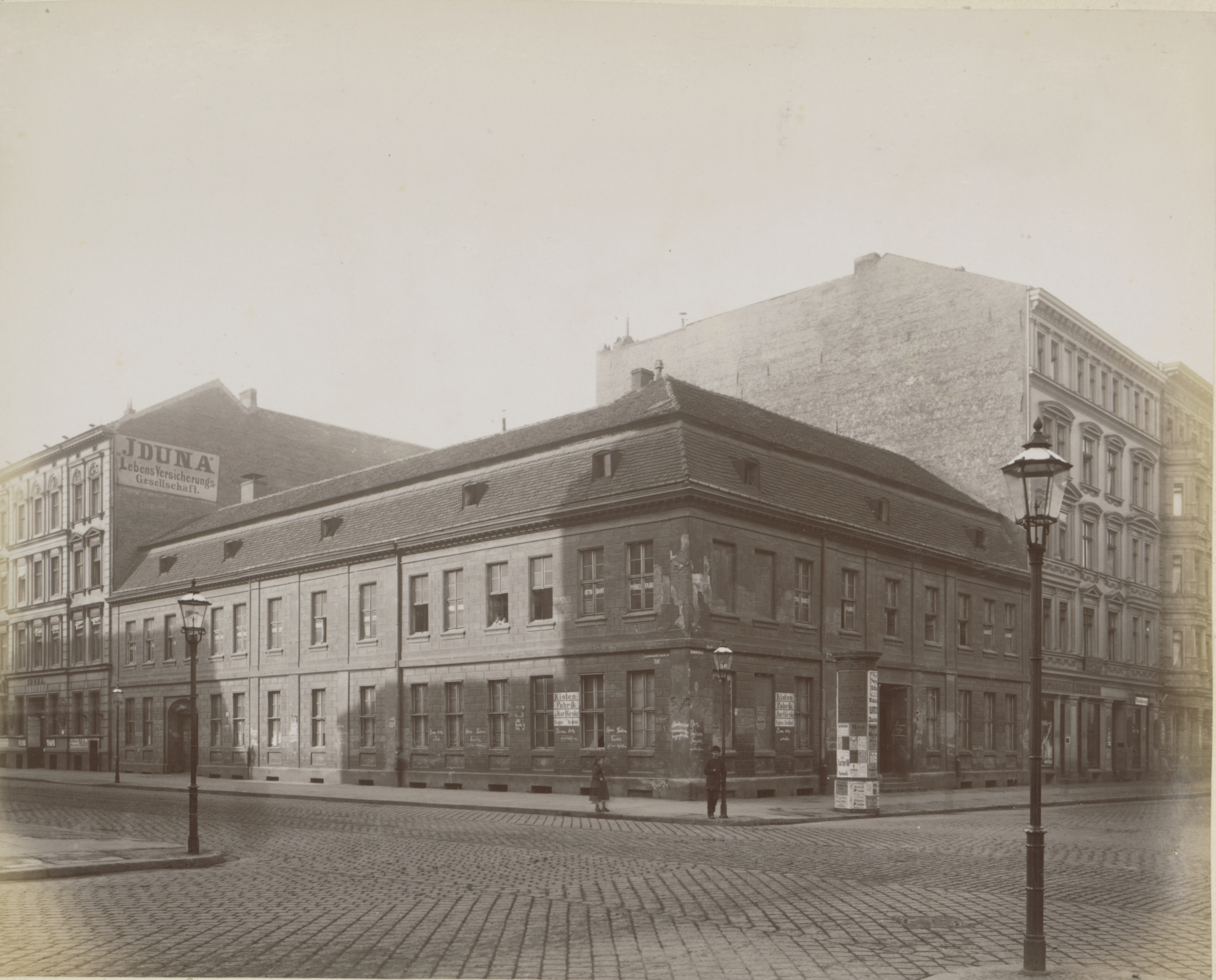 Das Haus des "starken Mannes" Johann Carl von Eckenberg in der Zimmerstraße, Fotografie. Das Gebäude ließ Johann Carl von Eckenberg 1732/33 nach Plänen von Philipp Gerlach auf dem Grundstück Zimmer-/Ecke Charlottenstraße in Berlin errichten. Da einer der späteren Besitzer der Hofmarschall Thiele war, wurde es auch als Thielsches Haus bezeichnet. Von 1806 bis 1836 war das Haus Sitz der Oberbaudeputation und der Bauakademie. Danach Sitz des Berliner Kreisgerichts und später des Landgerichts. 1888 wurde das Haus abgebrochen.